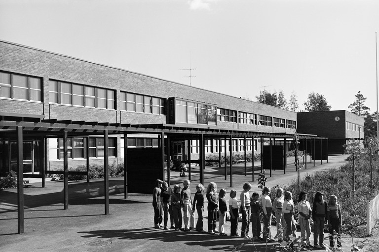 Koululaiset jonossa syyskuussa Pihlajiston ala-asteen pihalla.